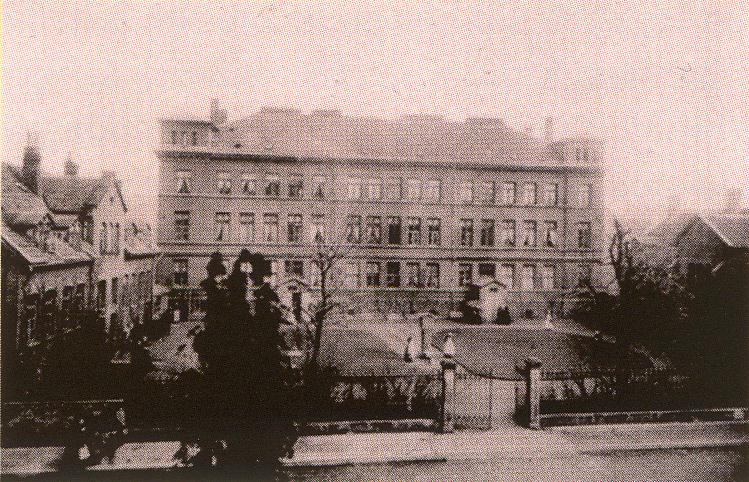 Punktgerasterter Abdruck einer Aufnahme eines nicht genannten Fotografen: Das 1848 eingeweihte Gebäude zur Nutzung durch das Damenstift Schwesternhaus, auch bekannt als „Schwesternhaus in der Meterstraße“ Ecke Sextrostraße in der Südstadt von Hannover ...